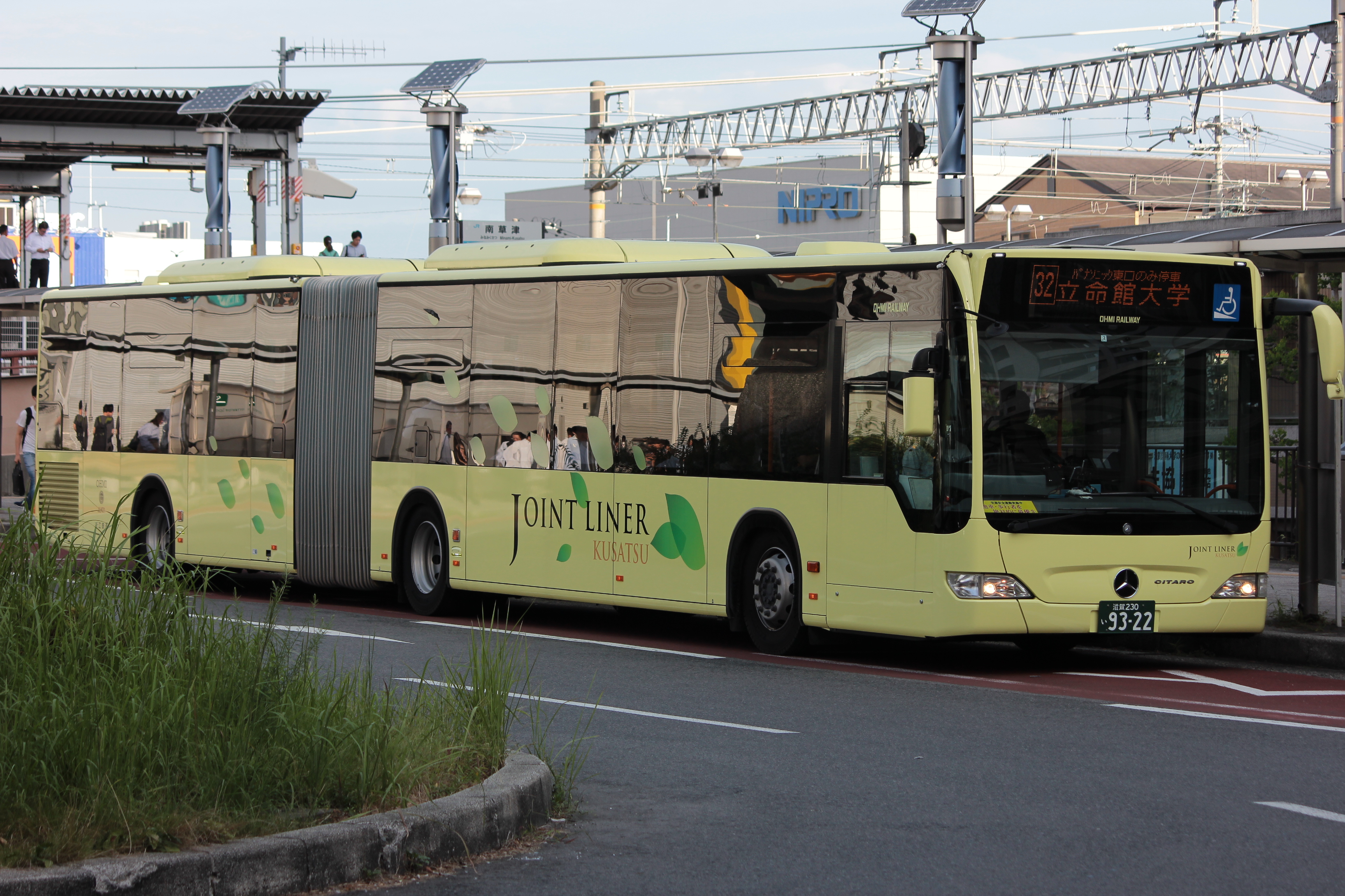 近江鉄道の連節バス「ジョイントライナー」（南草津駅前にて） Canon EOS Kiss X5